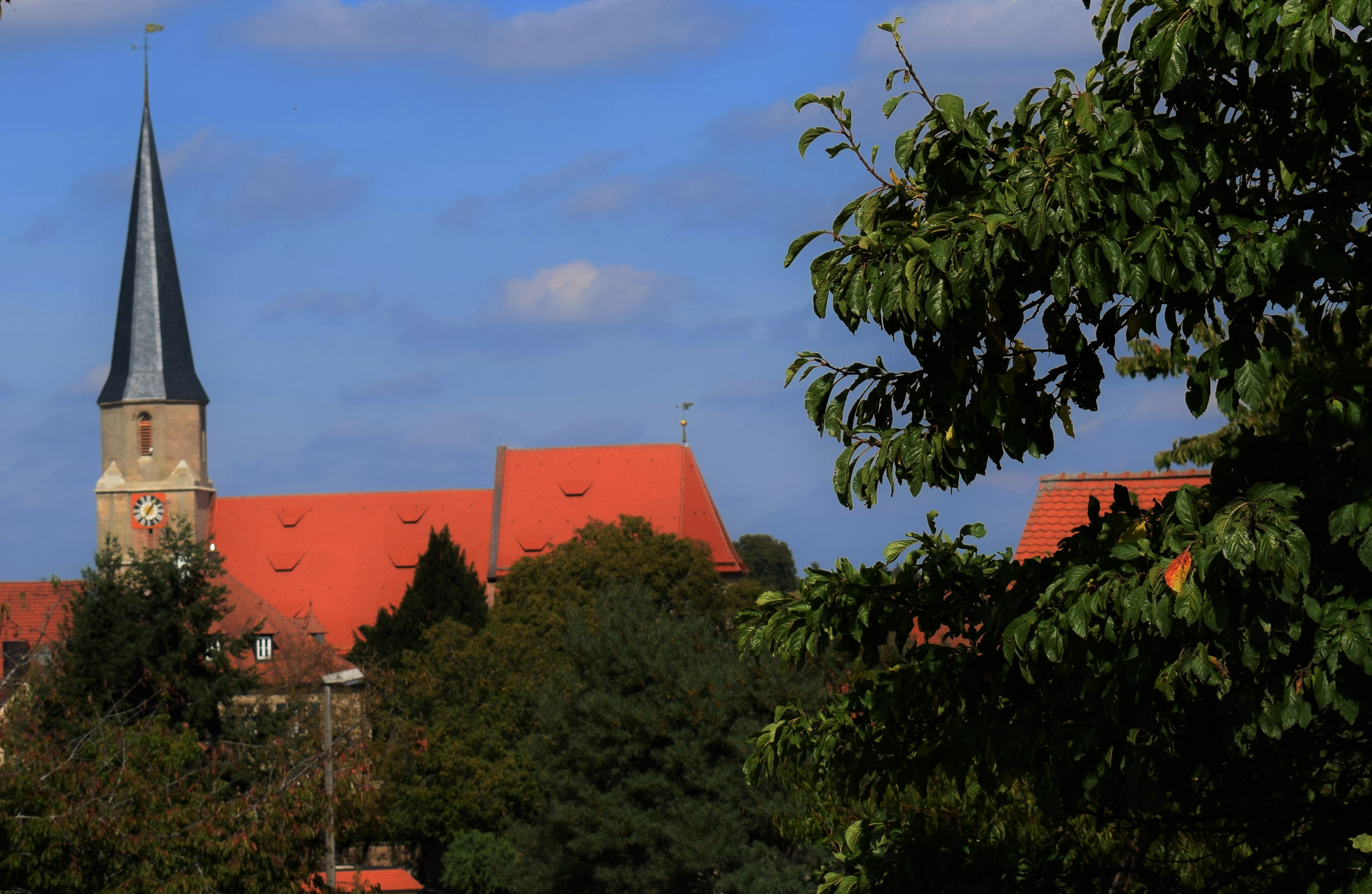 Rieterkirche Kalbensteinberg: Blick auf die Kirche von Süden (nach der Erneuerung der Dächer von 2019)